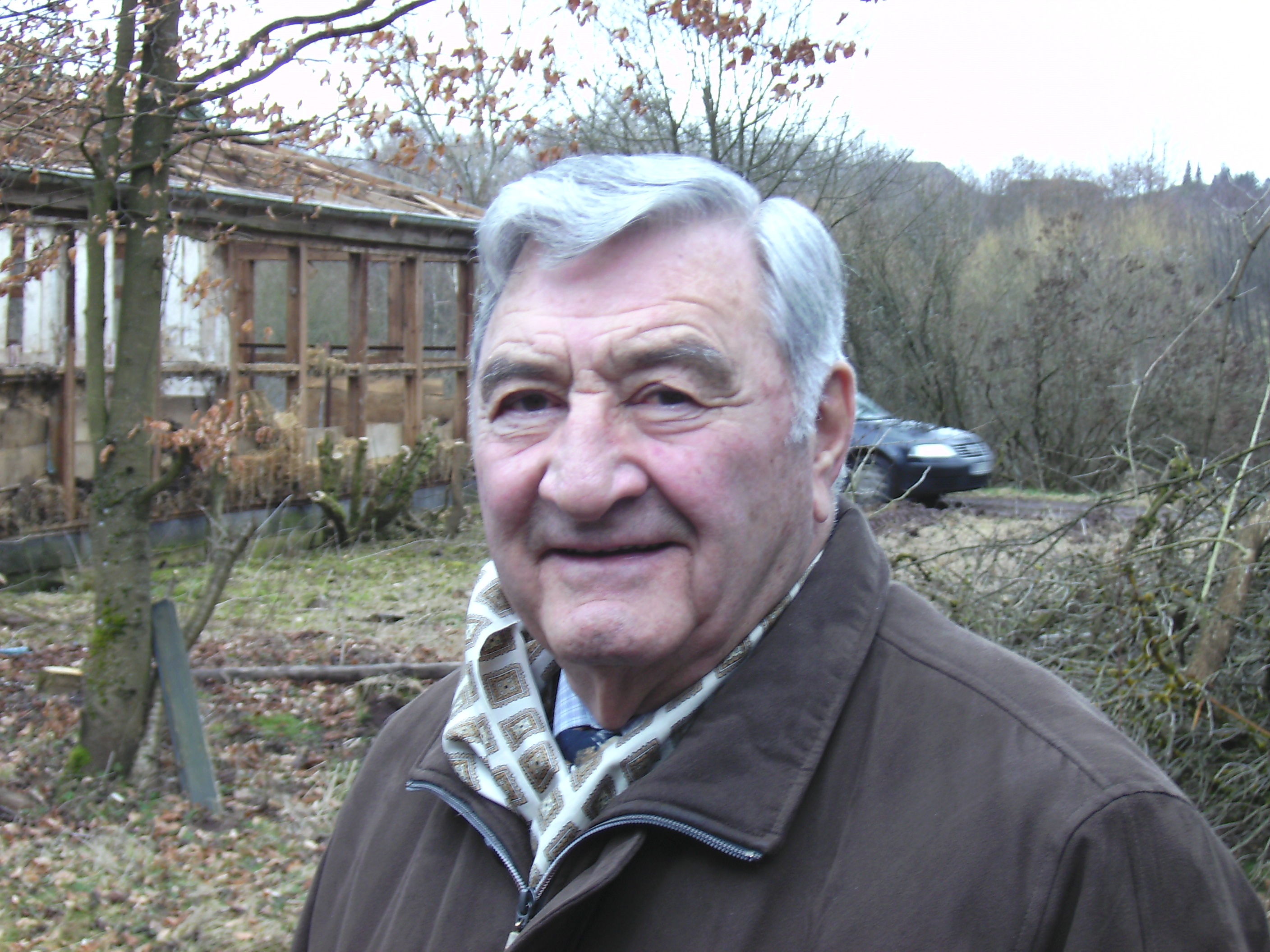 Portrait Rainer Wicklmayr